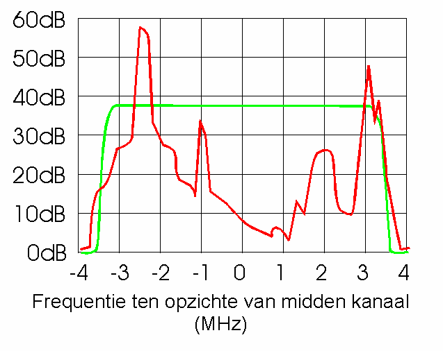 Frequentiespectrum TV signalen, analoog en digitaal.